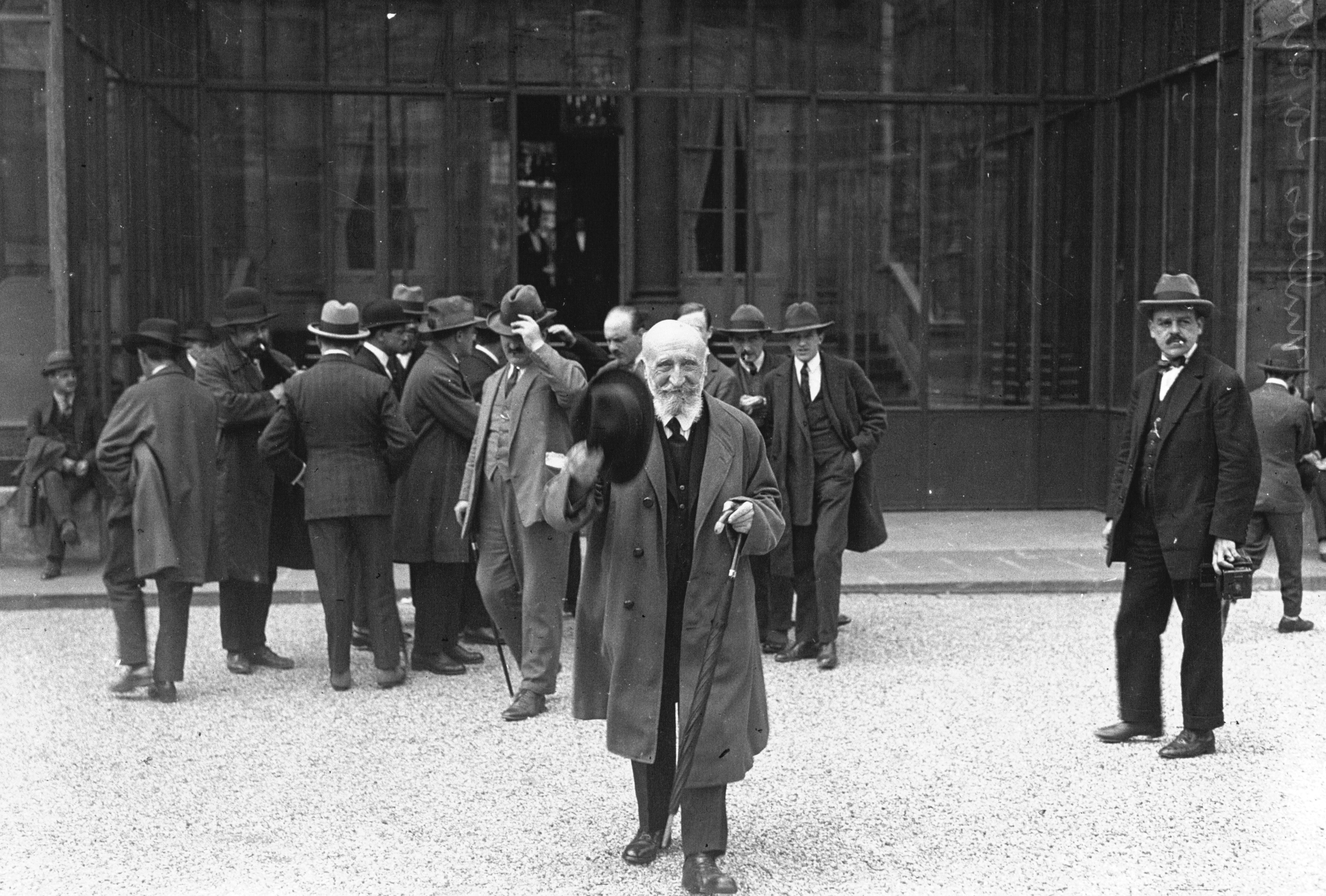 Consultation à l'Elysée : Millies Lacroix [photographie de presse]